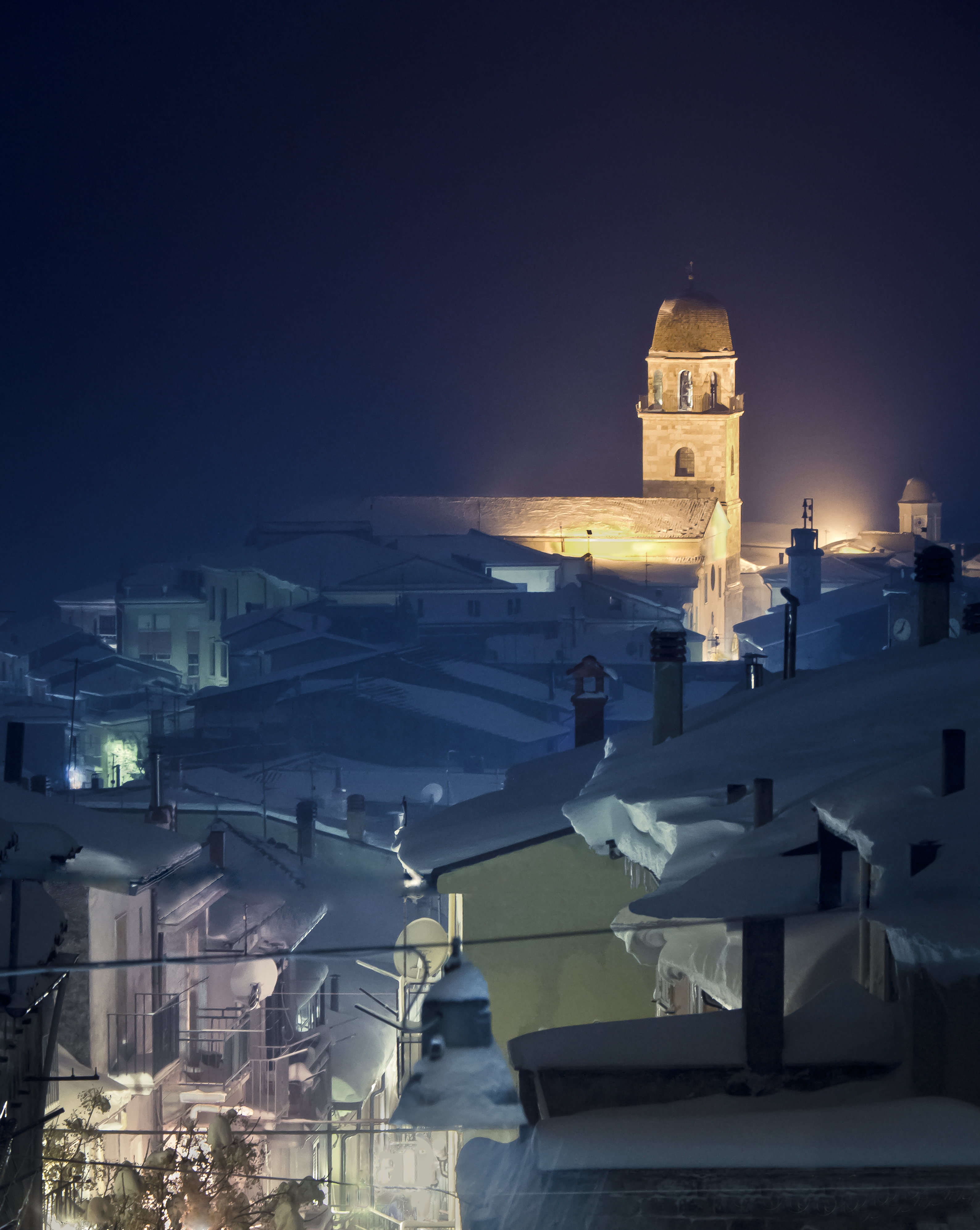 Chiesa Madre